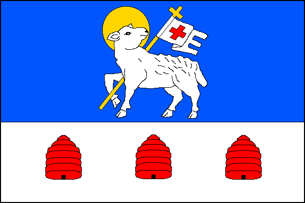 vlajka, Lampertice, okres Trutnov